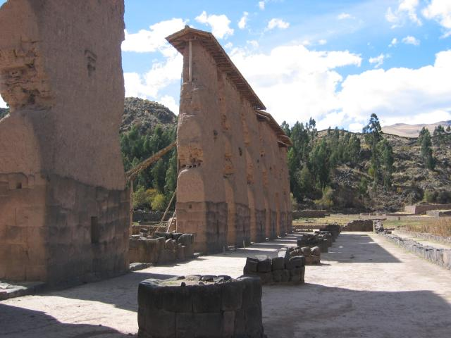 vue générale du temple de Raqchi